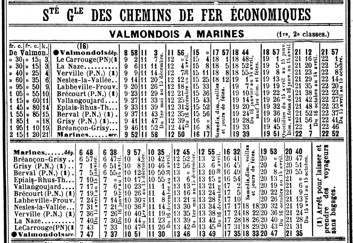 Tableau horaire de la ligne de chemin de fer secondaire Valmondois à Marines.